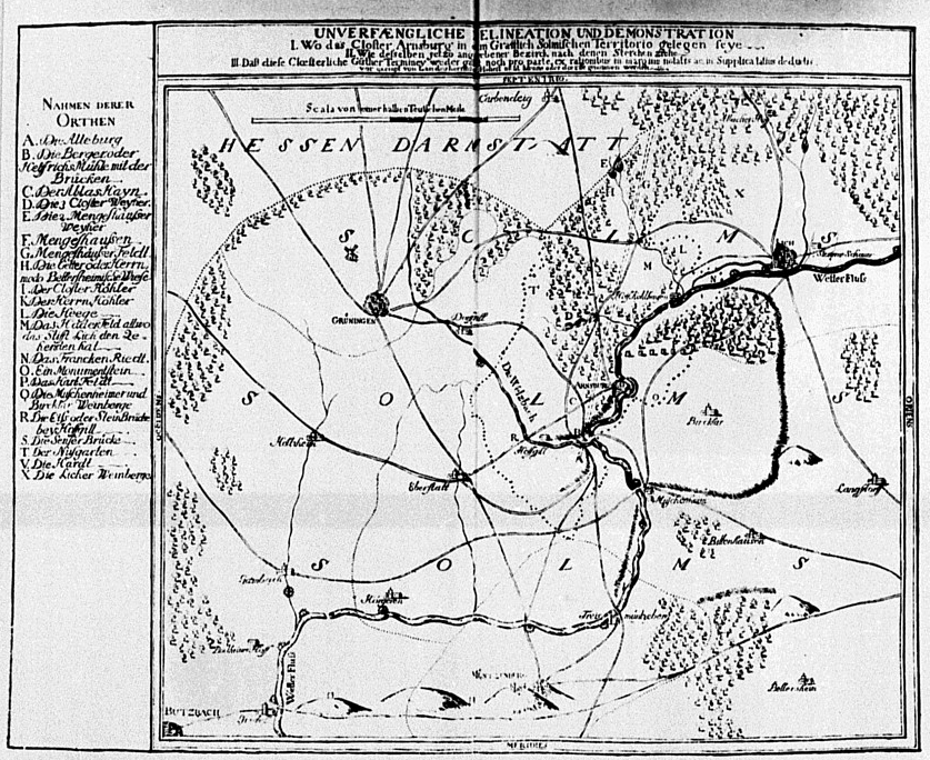 Karte der Umgebung des Klosters Arnsburg